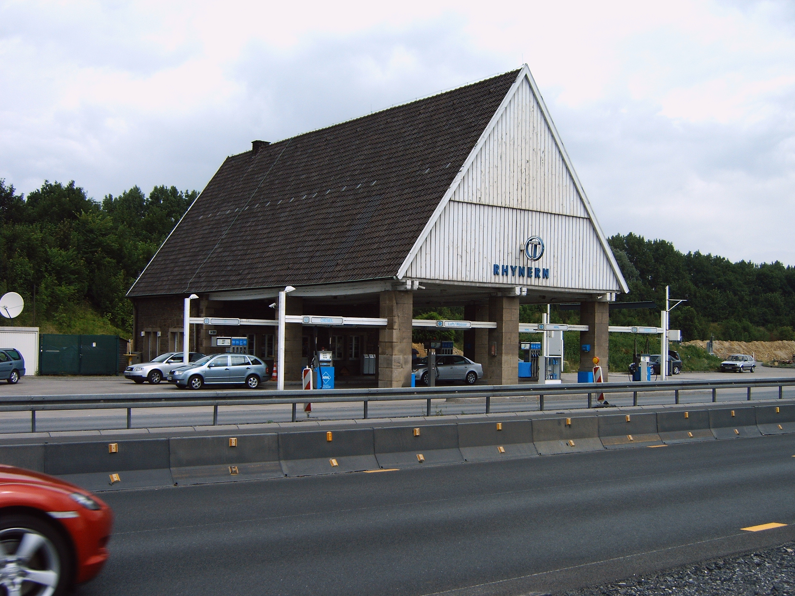 Hamm Rhynern Autobahntankstelle (Nordseite)